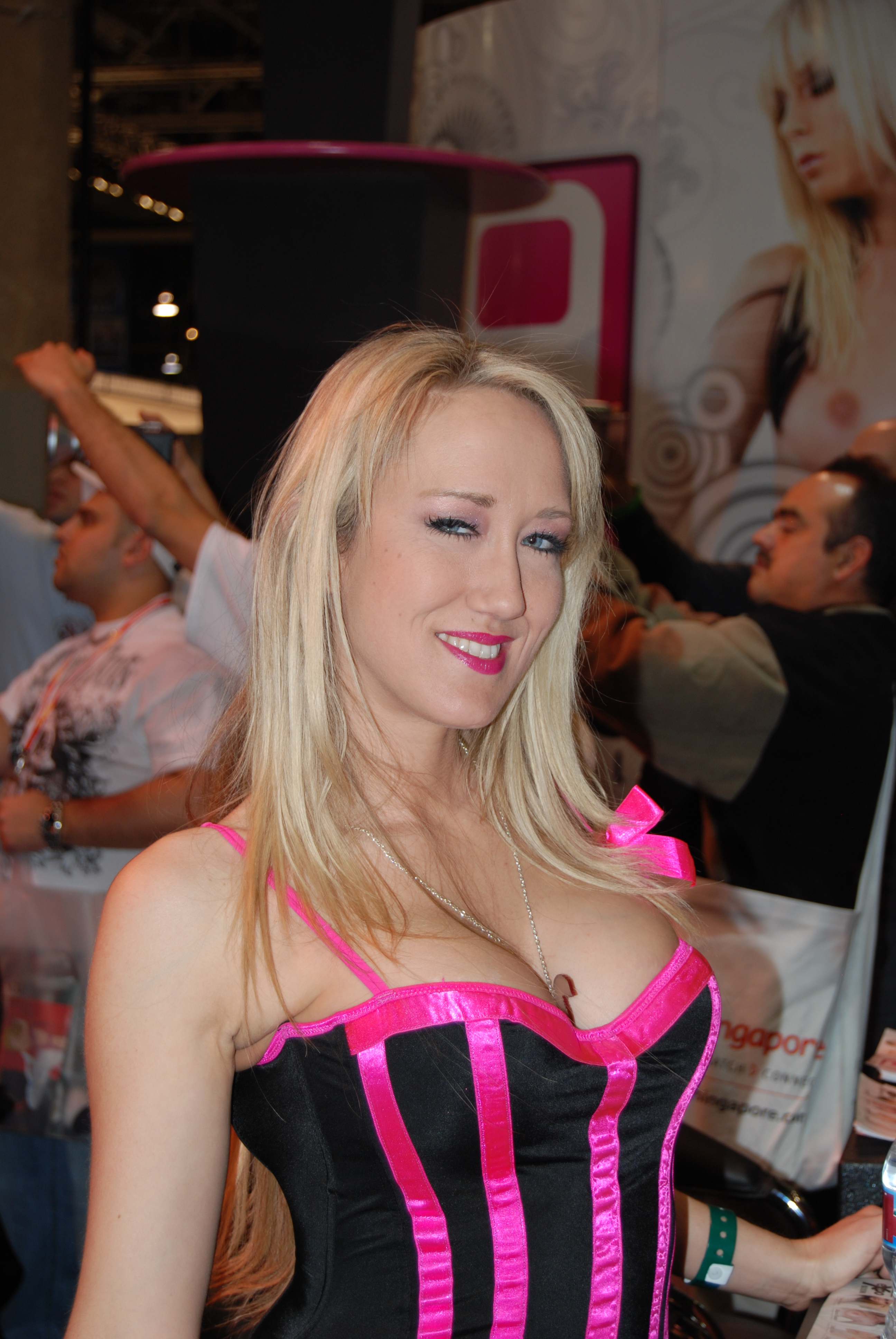 Alana Evans at AVN Adult Entertainment Expo 2008